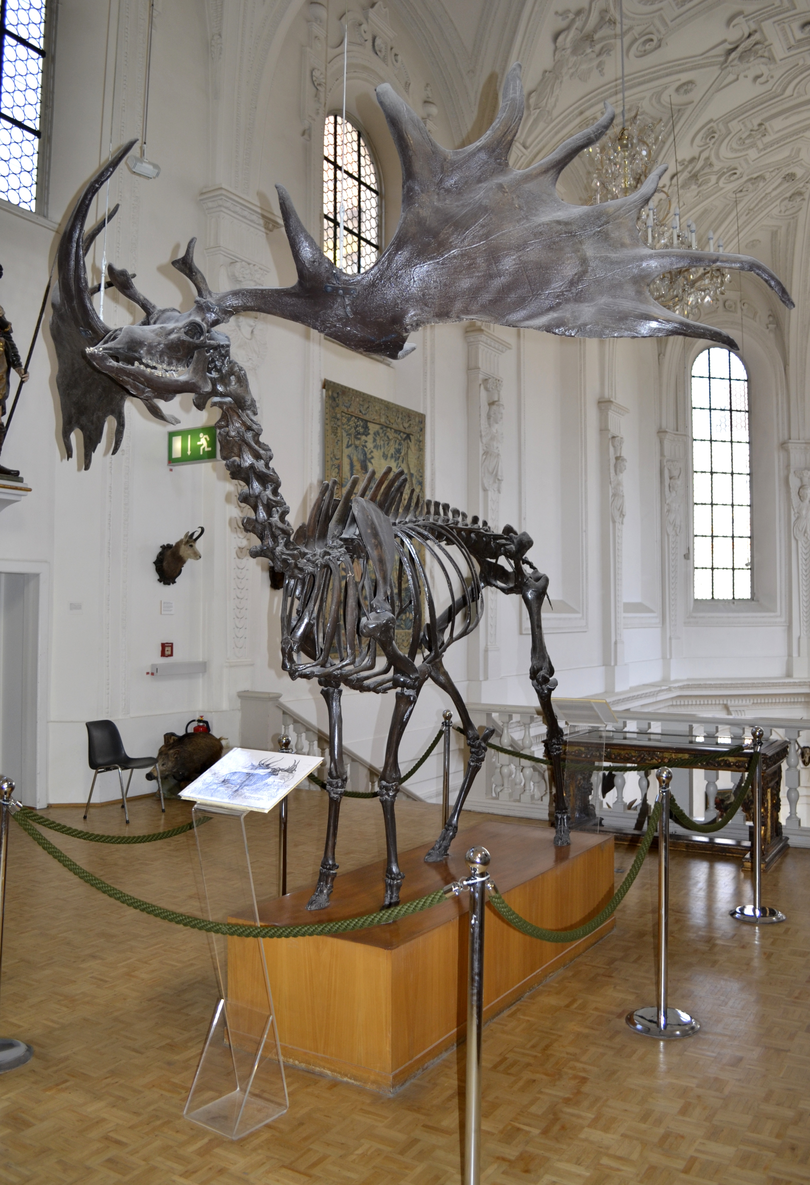 Megaloceros giganteus im Jagd- und Fischereimuseum in München. Es handelt sich hierbei um einen Moorfund; die Auslage des Geweihs beträgt 302 cm.